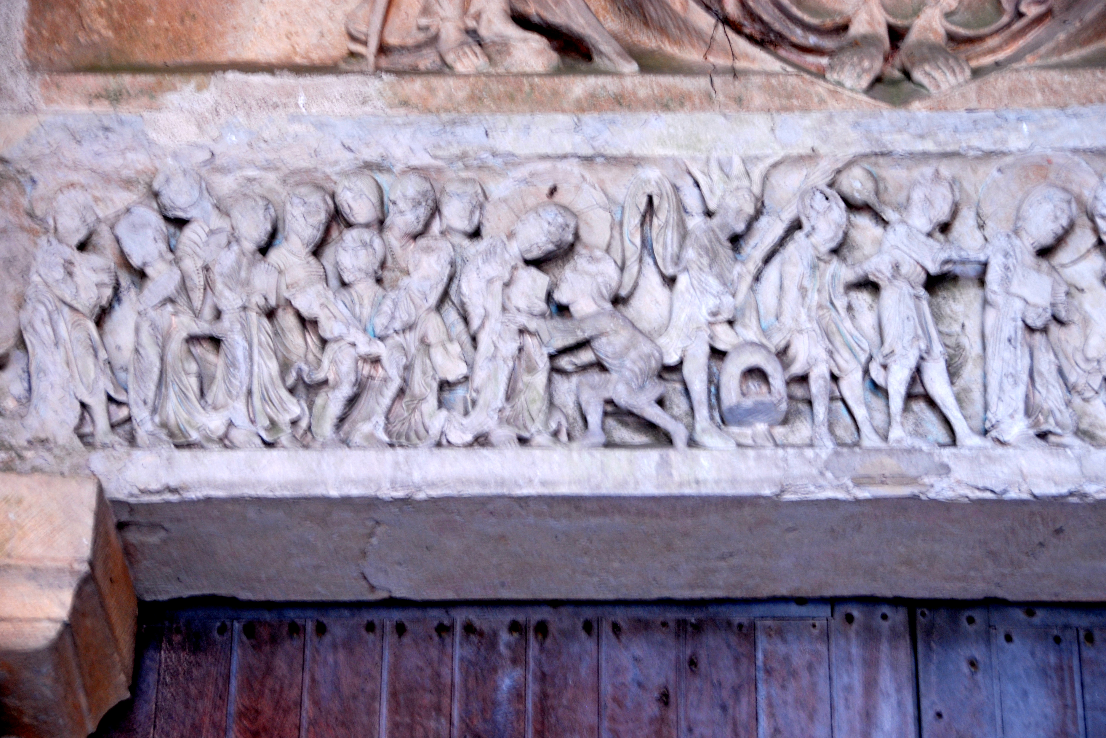 Portal, Türsturzrelief, links / Mitte